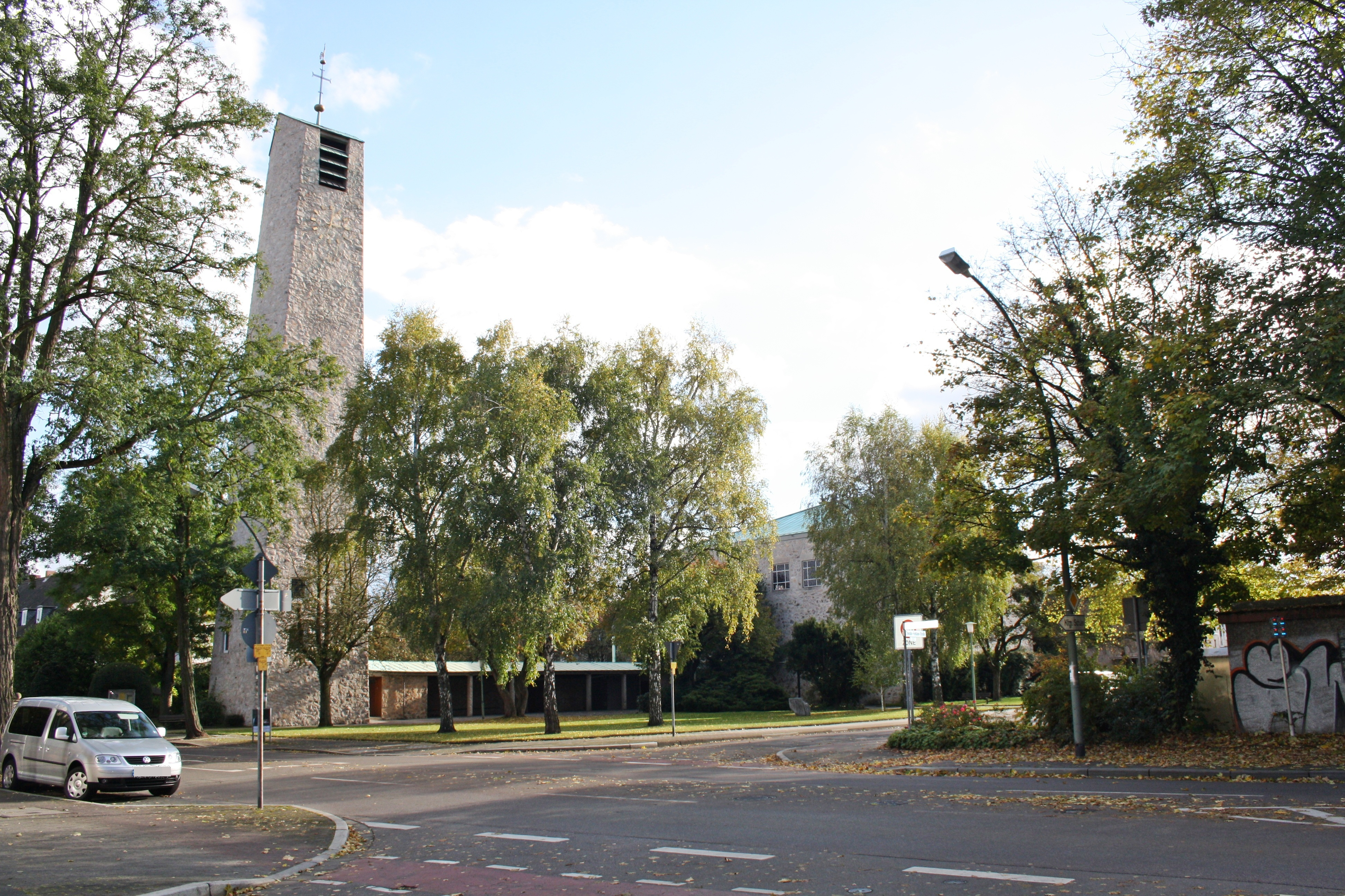 Hanau, (Neue) Johanneskirche, Frankfurter Landstrasse